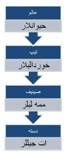 تۆرکجه: ات جیللر تاکسونومی سی